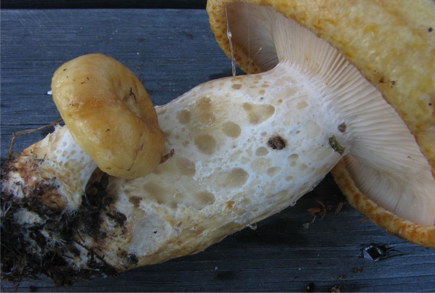 Lactarius scrobiculatus (Scop.) Fr.